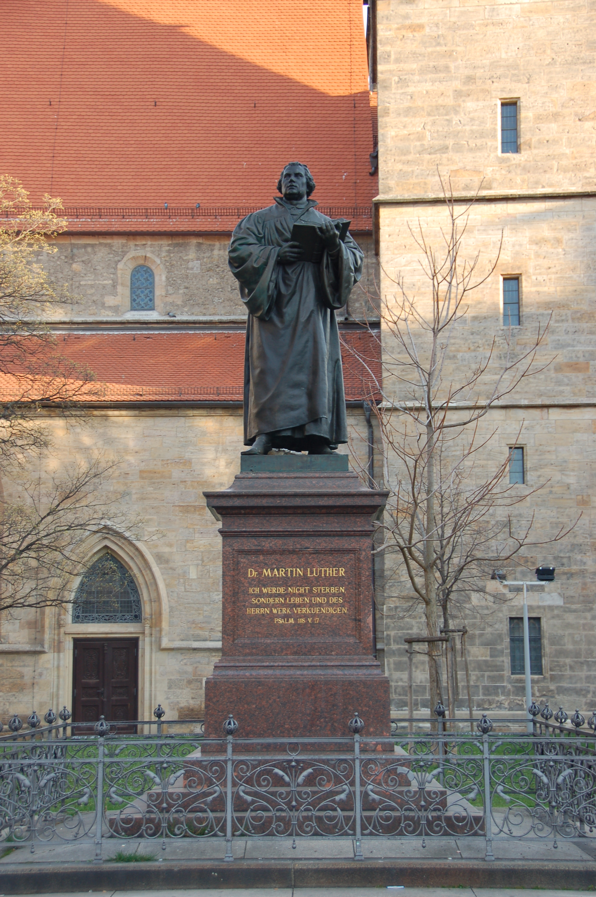 Lutherdenkmal auf dem Erfurter Anger